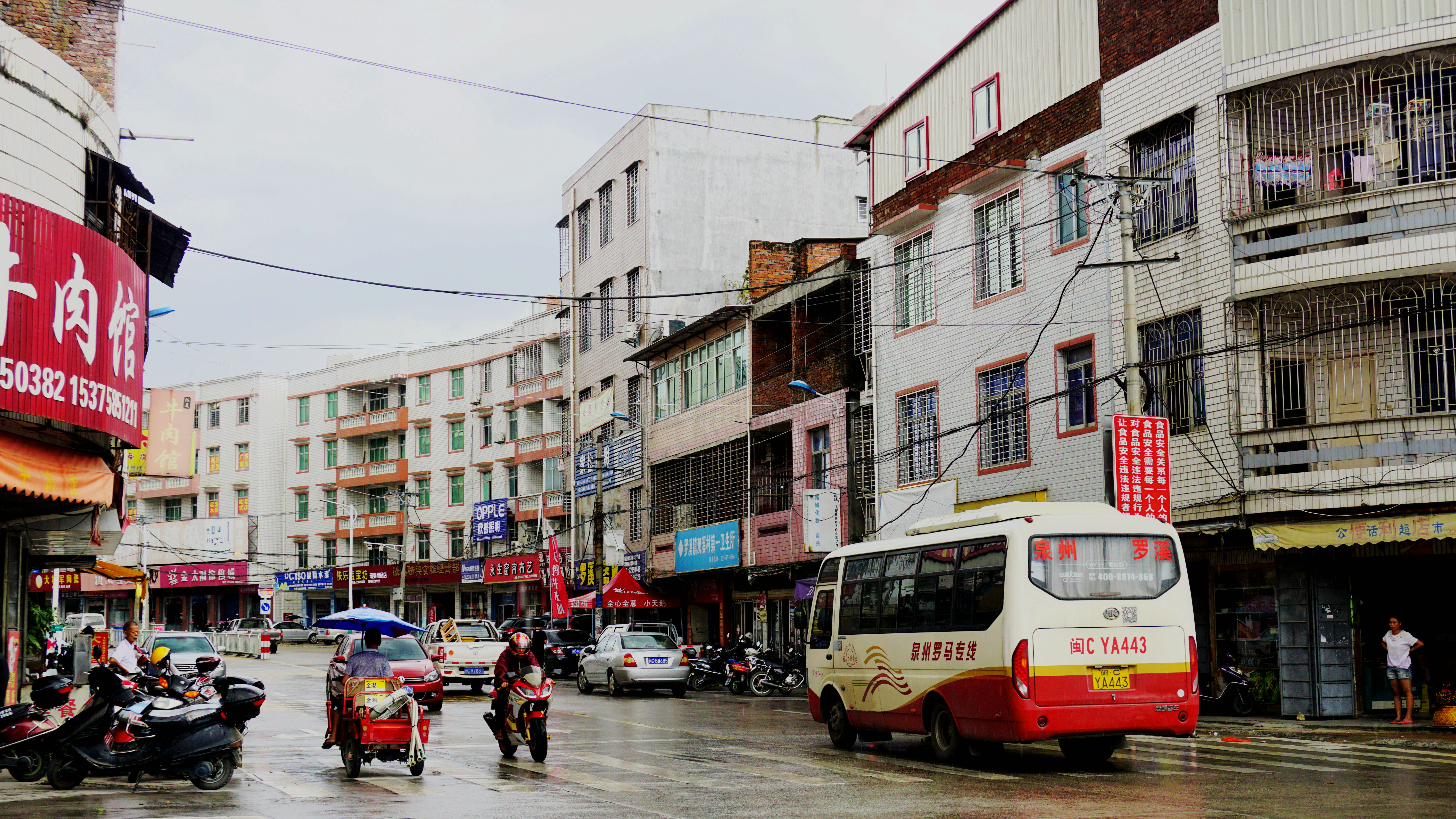 洛江区，罗溪镇区